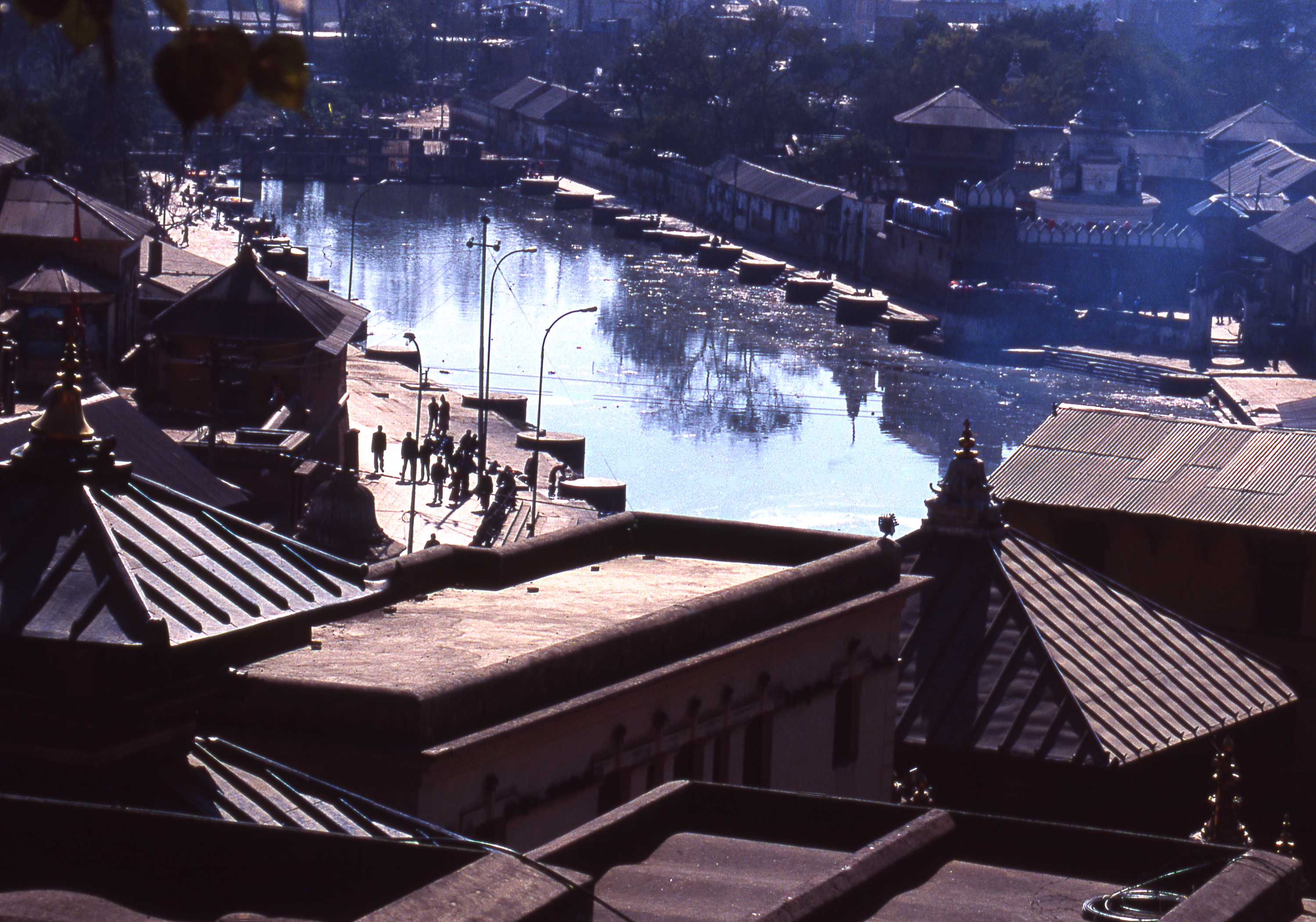 パシュパテイナート（Pashupatinath）パグマティ川火葬場俯瞰